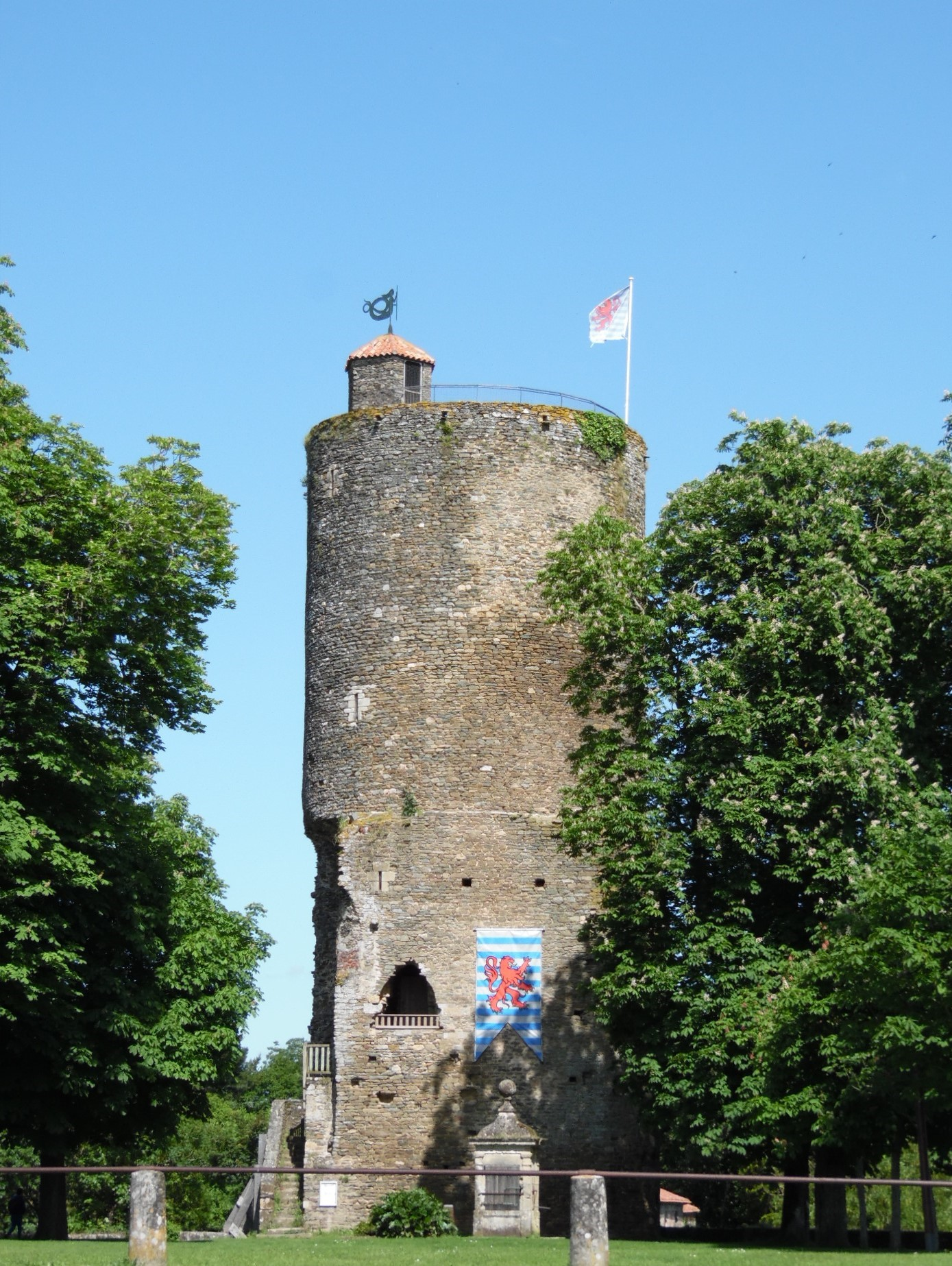 La Tour Mélusine vue de la Place du Bail. On peut y voir les armoiries des Lusignan.